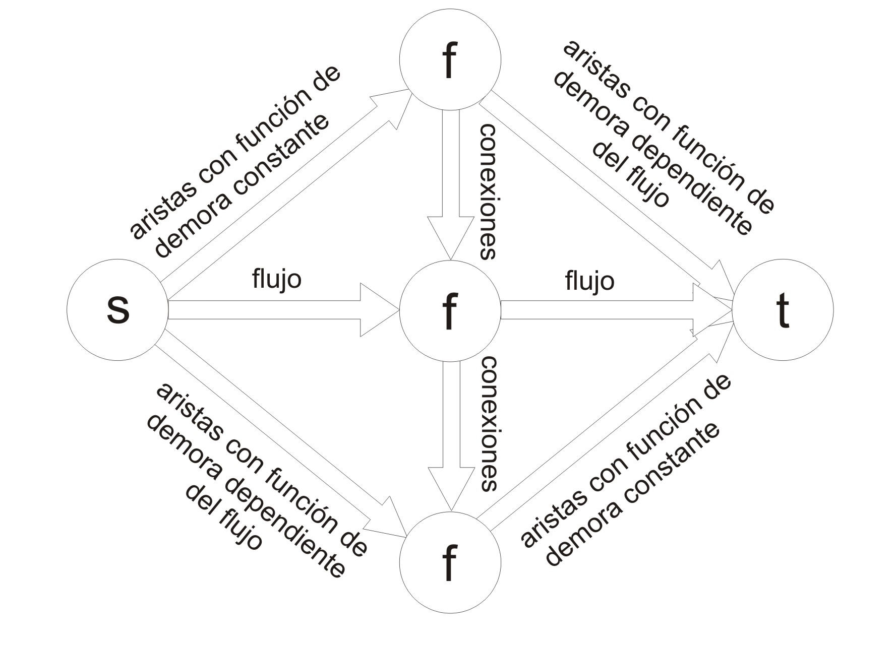 diagrama de clasificación de vias